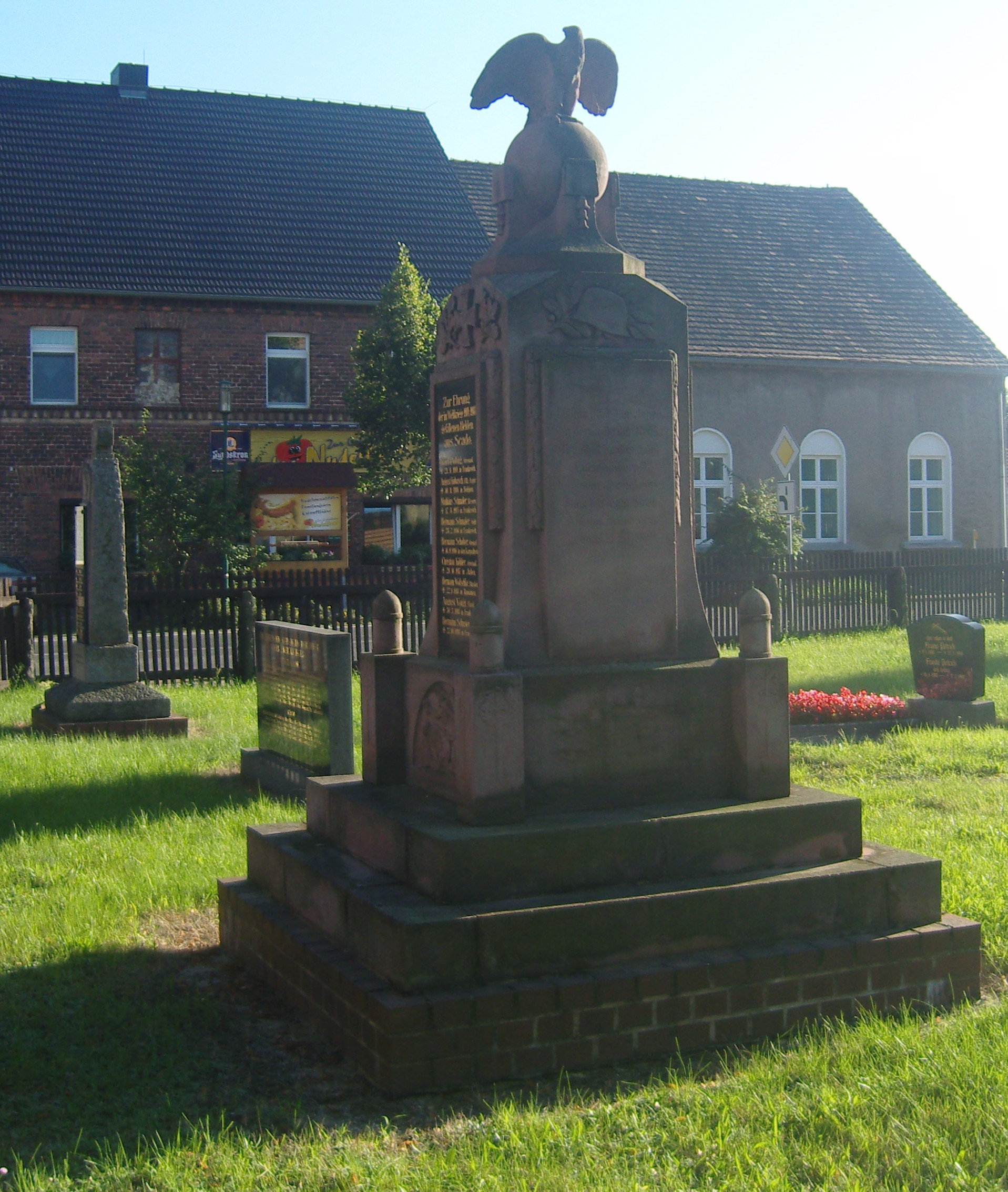 Kriegerdenkmal für die Gefallenen des Ersten Weltkrieges aus Scado, das Denkmal des devastierten Ortes steht auf dem Kirchhof in Geierswalde, Gemeinde Elsterheide